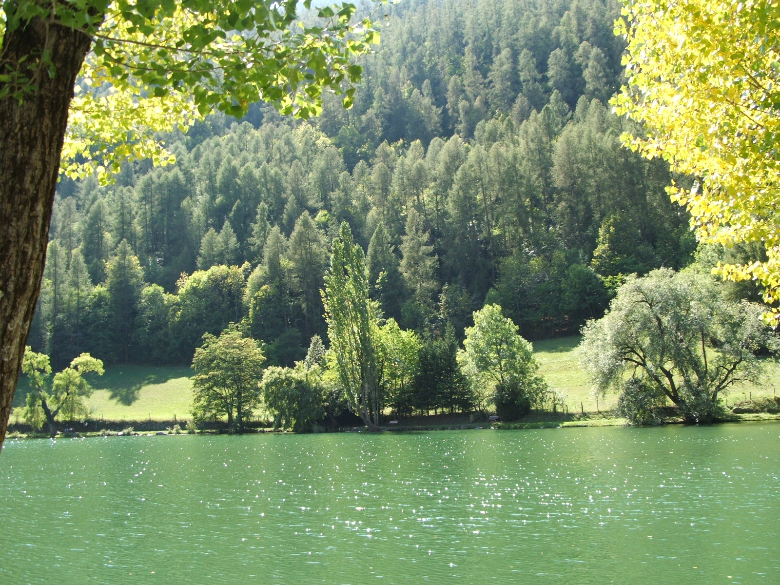 Le Lauzet-Ubaye, département des Alpes-de-Haute-Provence, France